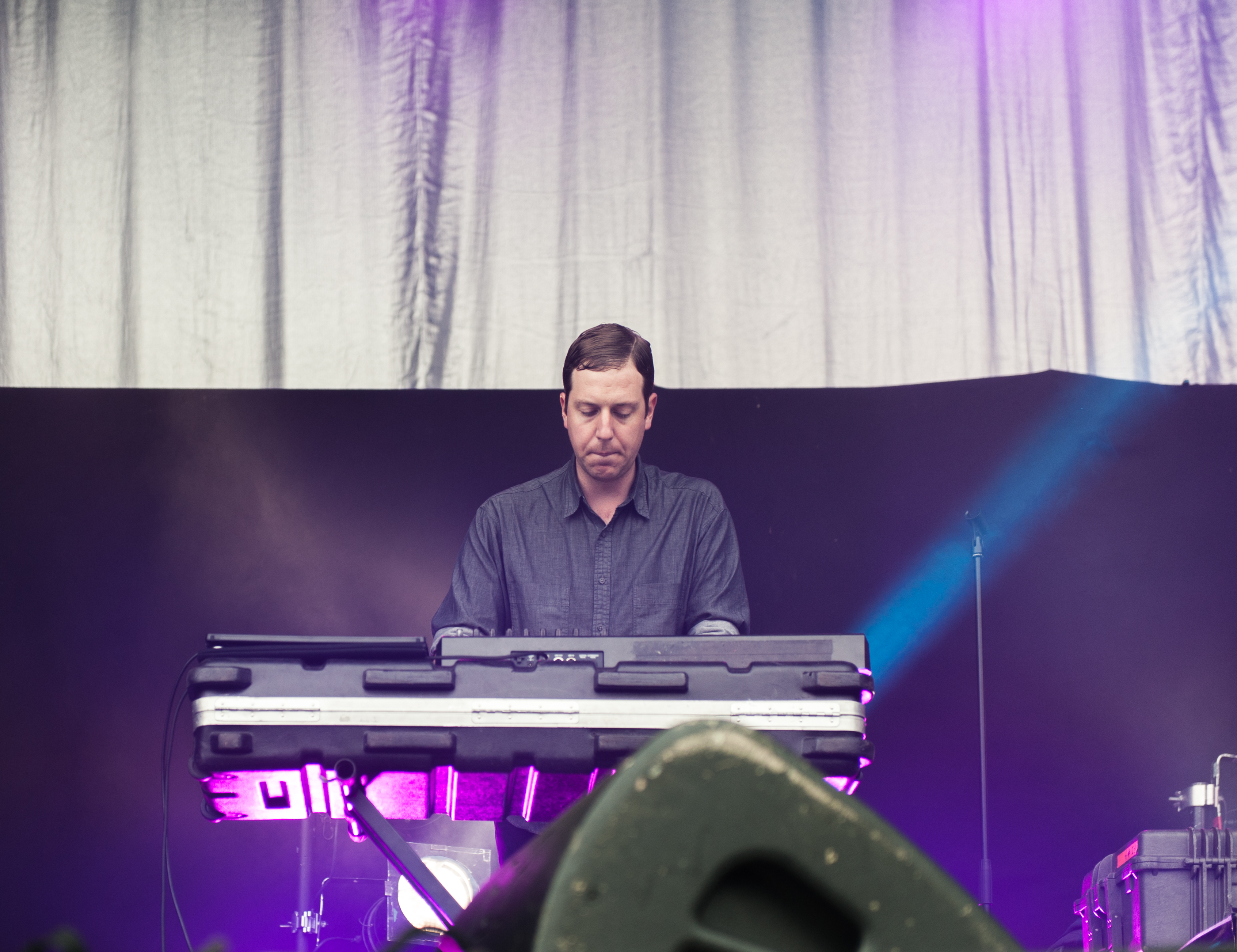 Die Band Future Islands auf dem Kosmonaut Festival 2015 in Chemnitz Oberrabenstein.